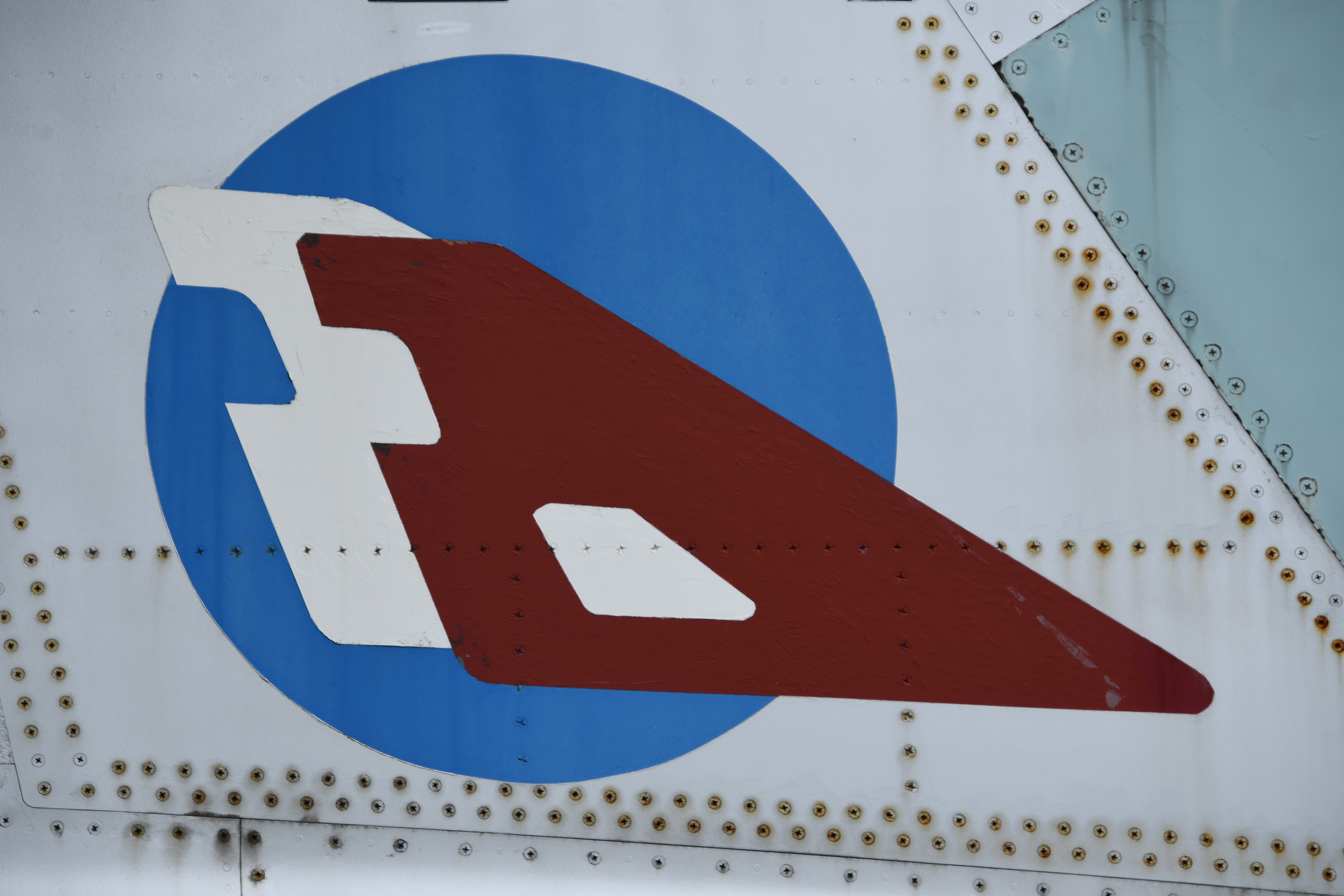 航空自衛隊 F-104J戦闘機（46-8646号機） 垂直尾翼に描かれた第205飛行隊部隊章。2018年9月17日 小松基地にて。